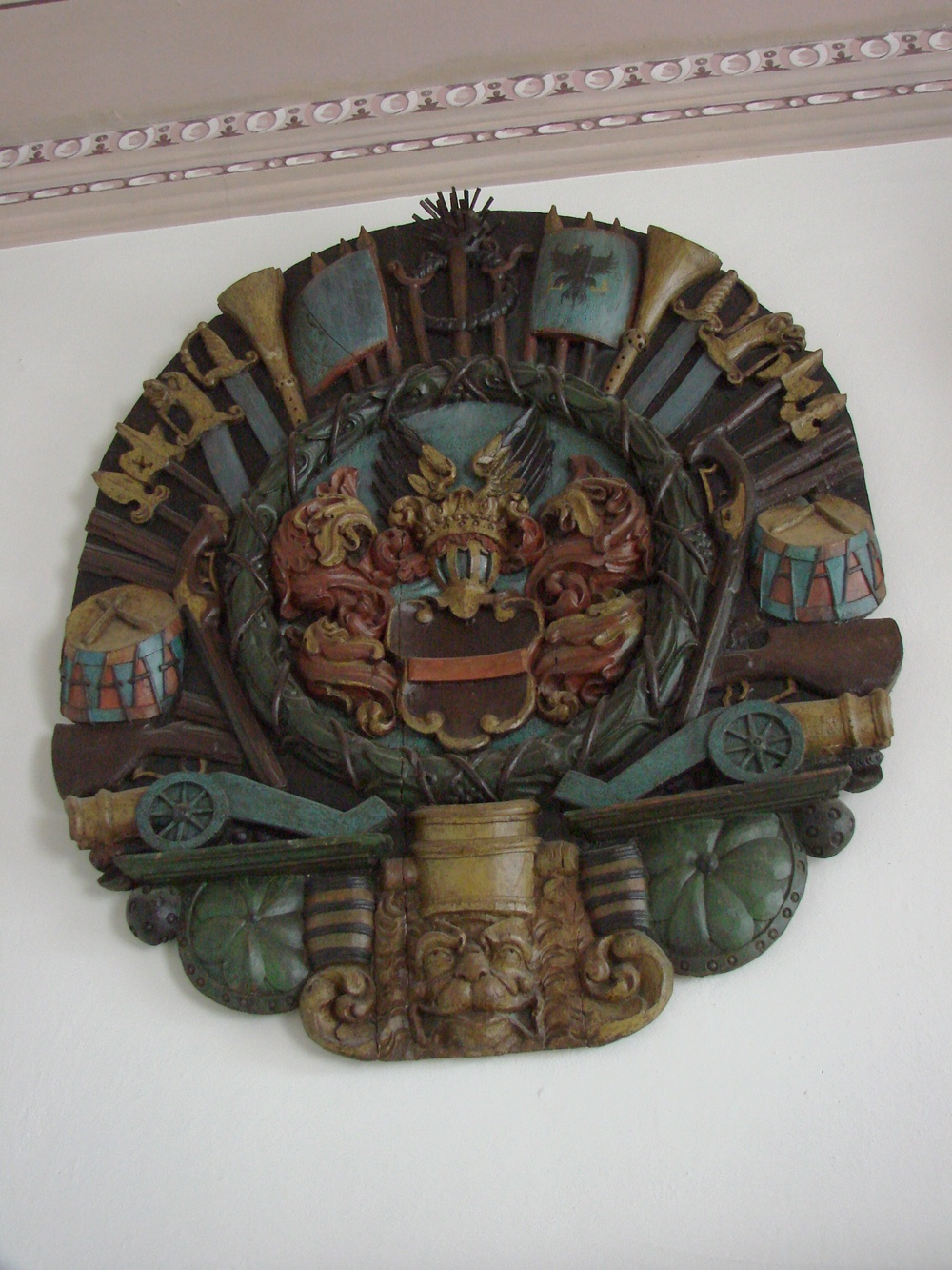 Epitaph der Fam. Manteuffel aus dem ehem. Kirchengebäude in Sternin